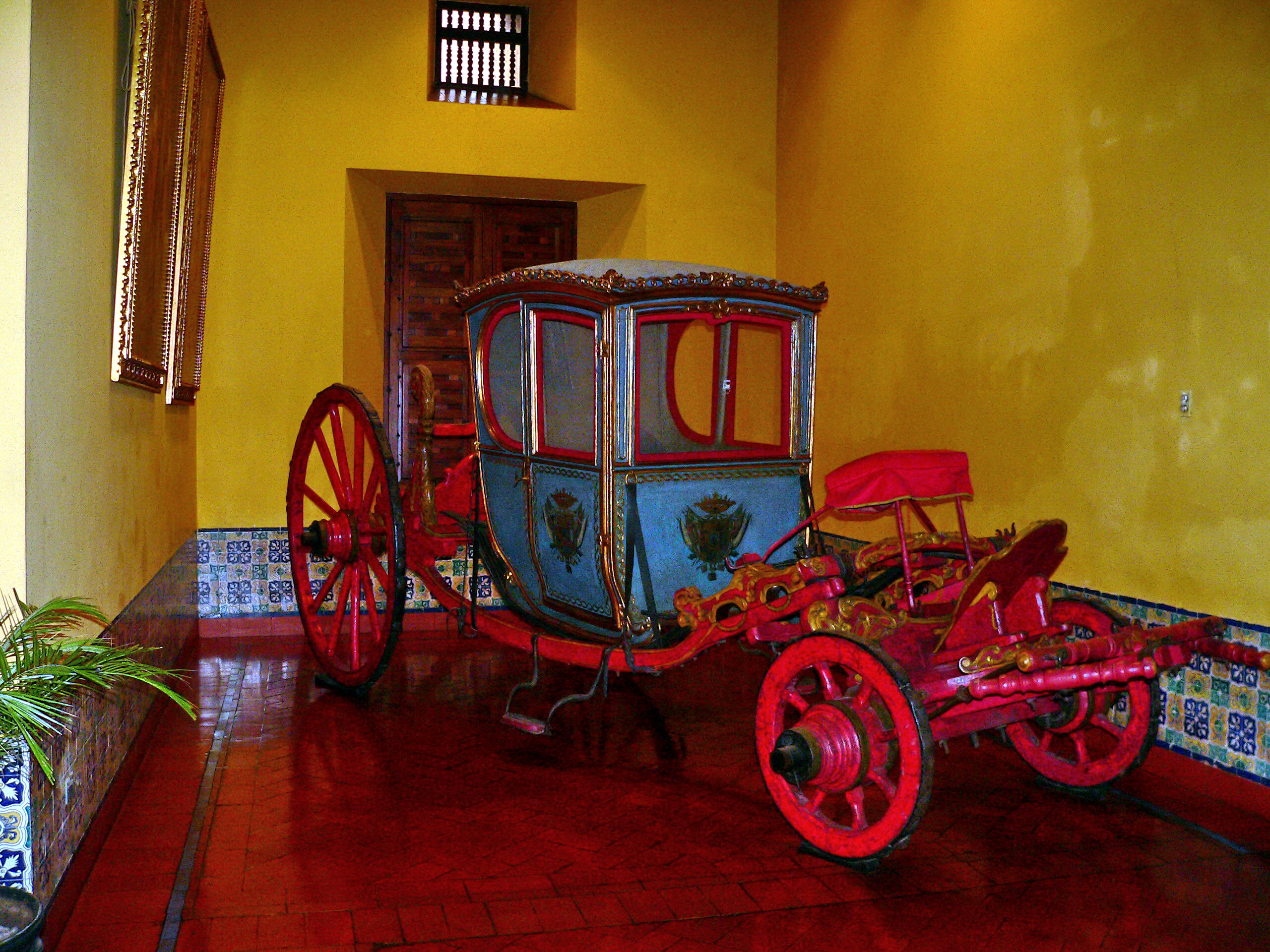 Descripción: Carruaje de la familia Ortiz de Zevallos, tal como se puede ver en el escudo de armas de las puertas. Antigüedad: Siglo XVIII Lugar: Ministerio de Relaciones Exteriores del Perú Distrito : Cercado de Lima Ciudad : Lima País : Perú Fotógrafo: Manuel González Olaechea y Franco Fecha de la foto : 8 de julio de 2007